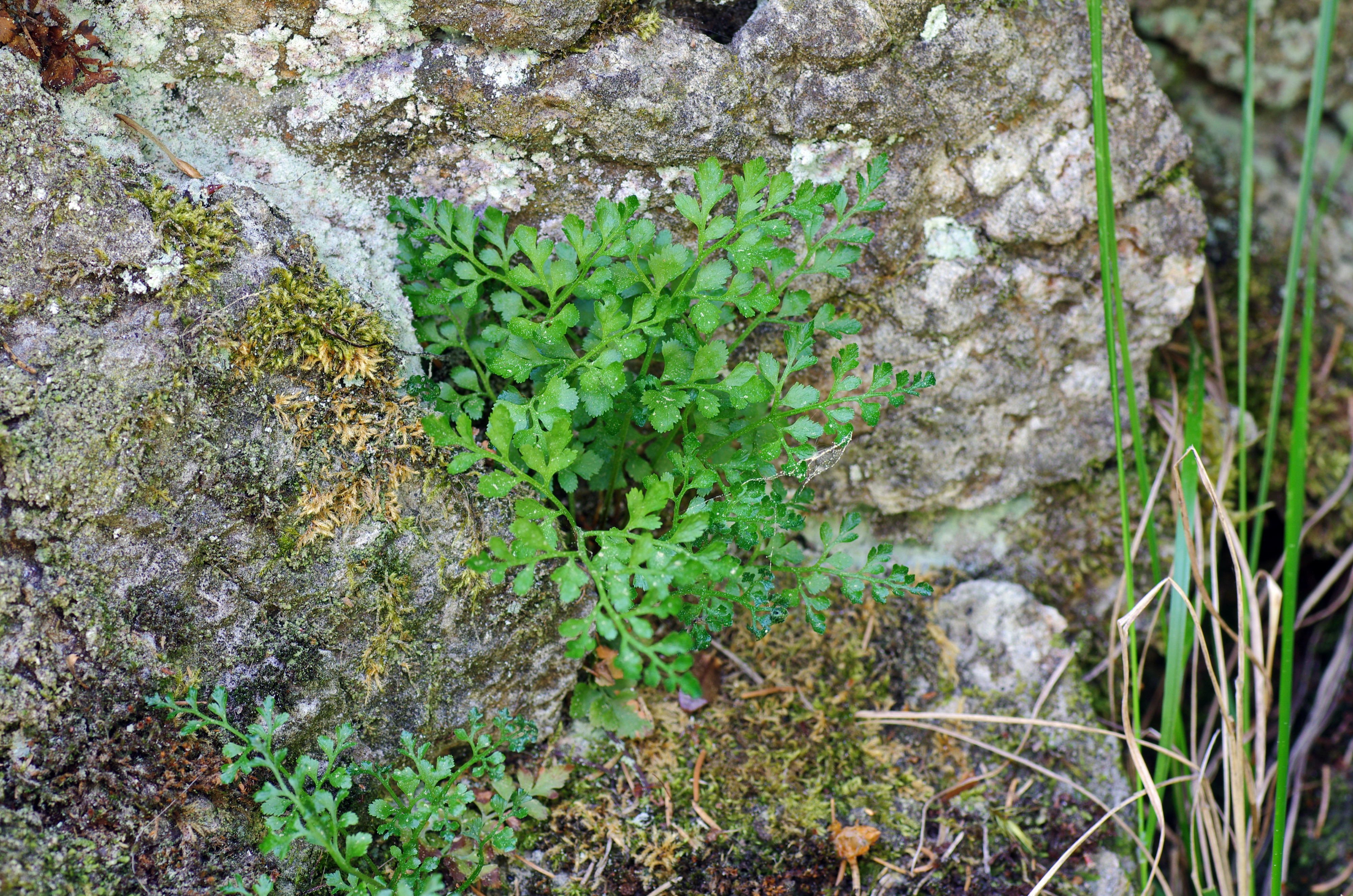 přírodní rezervace Vlček - sleziník hadcový, Slavkovský les, okres Cheb